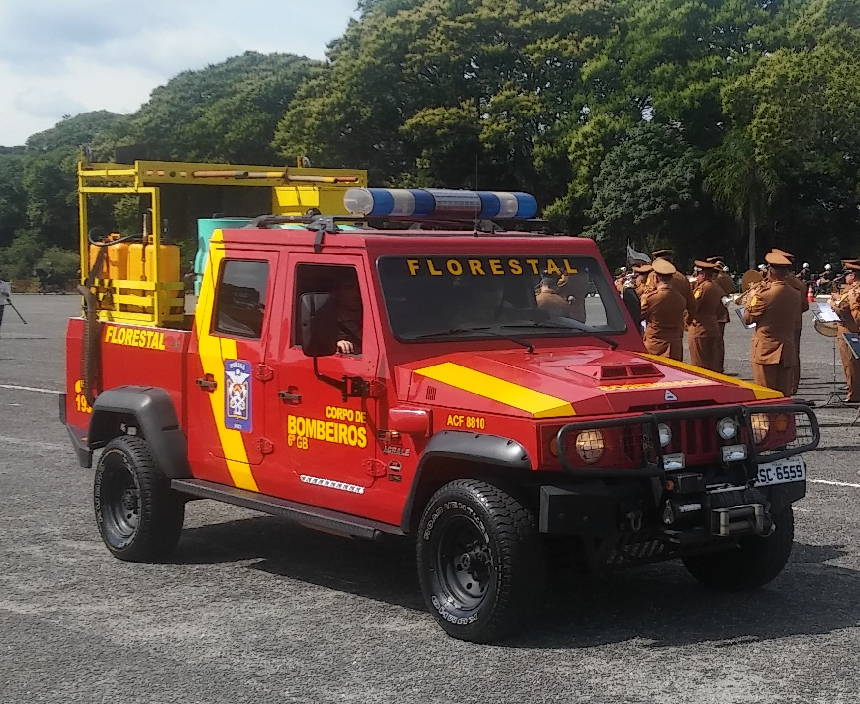 Viatura de Combate a Incêndios Florestais do Corpo de Bombeiros do Paraná.